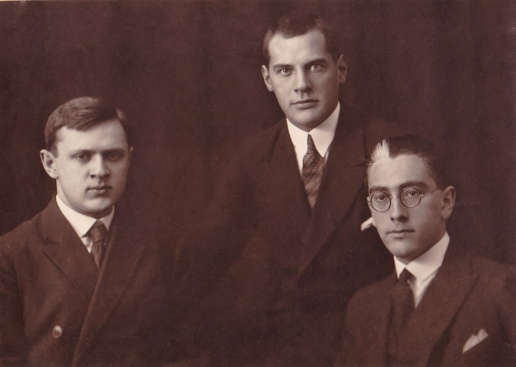 Каринский Сергей Сергеевич (1905-1984), в центре, 1930-31 год, Москва